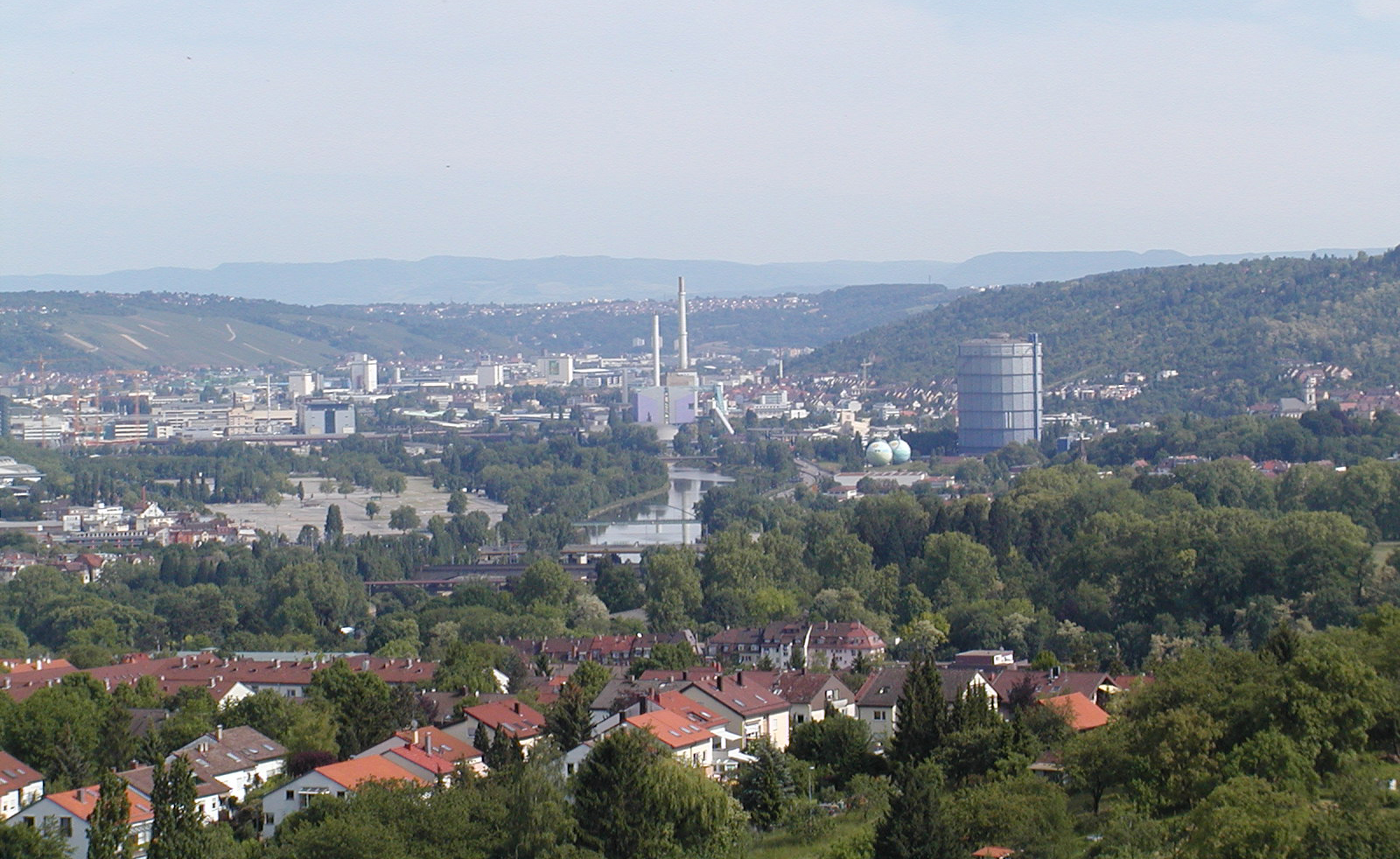 Das Kraftwerk, der Neckar und der alte Gasspeicher